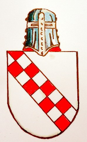 Das Wappen des Adelsgeschlecht der von Torgau 13 Jh., es ist nicht identisch mit dem Wappen der Stadt Torgau von 16 Jh..